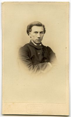 Hugo Hermann Fürchtegott Treffner (17 July 1845 – 13 March 1912), Estonia